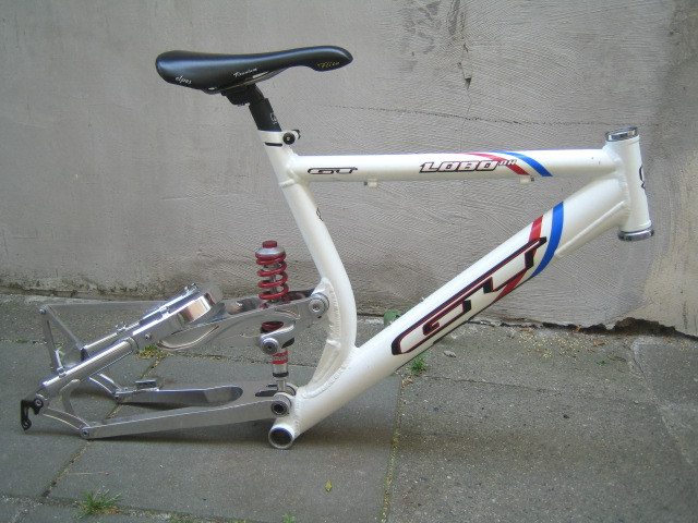 GT Lobo DH Rahmen